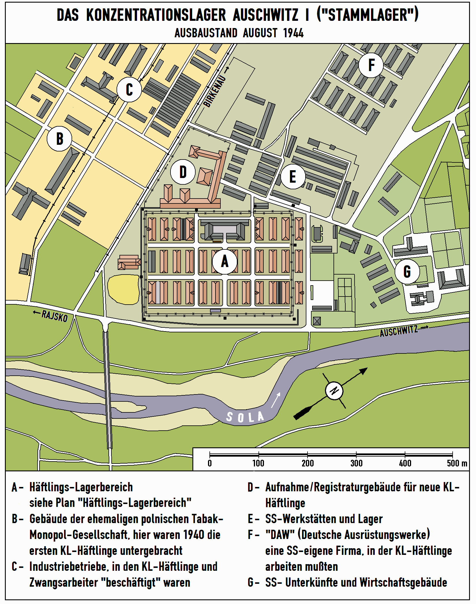 Der Plan zeigt das Konzentrations- und Vernichtungslager Auschwitz I (Stammlager) im Ausbaustand vom August 1944.